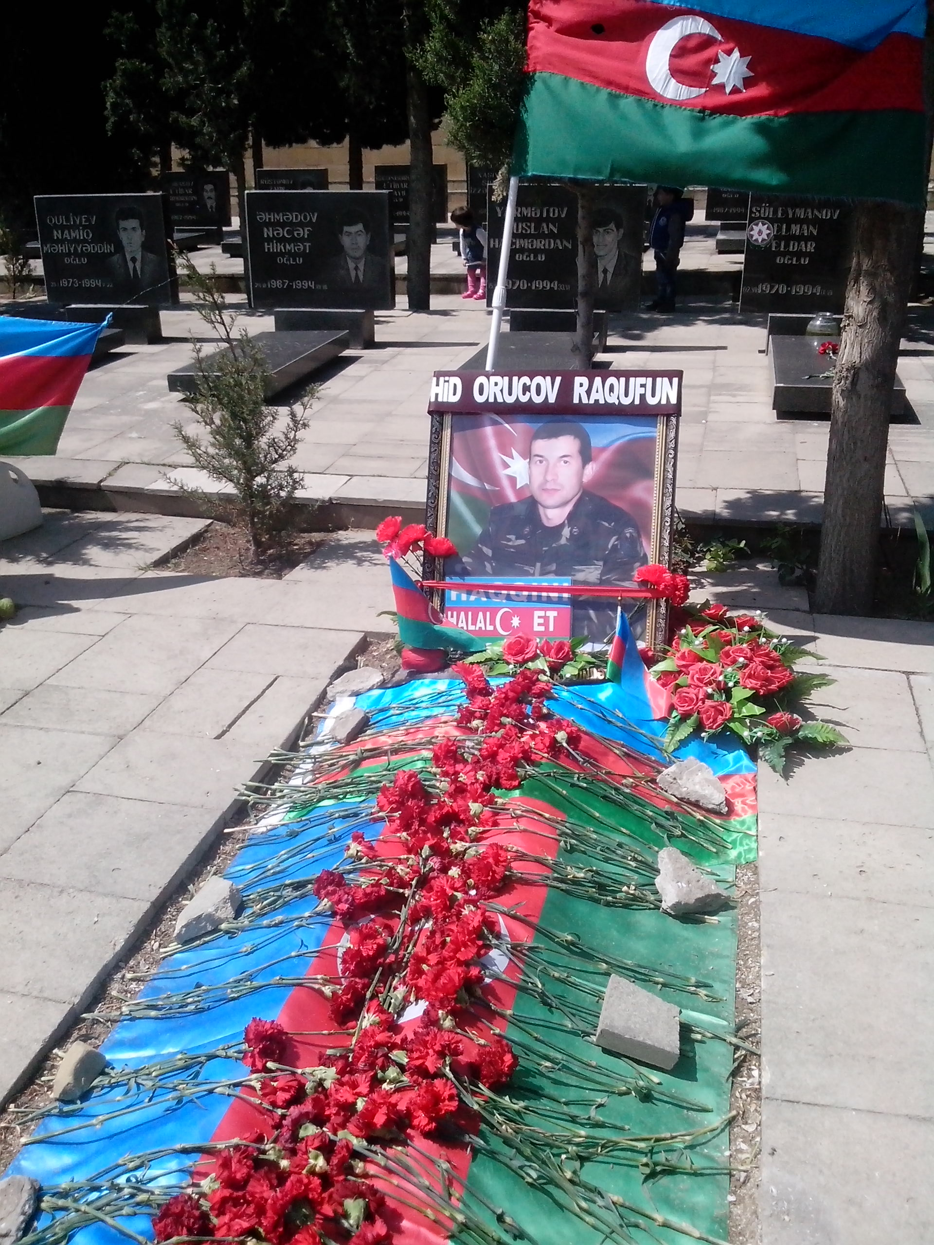 Sumqayıt Şəhidlər Xiyabanında dəfn olunan şəhid